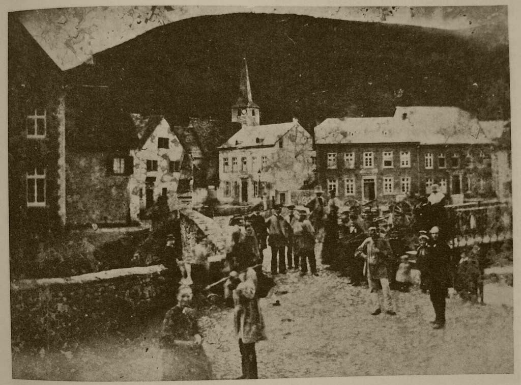 Foto einer Daguerreotypie von Josef Lemling Gemünd 1855